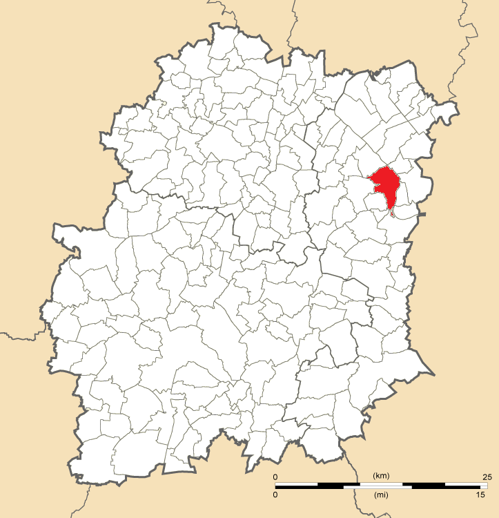 Carte de position de Corbeil-Essonnes en Essonne